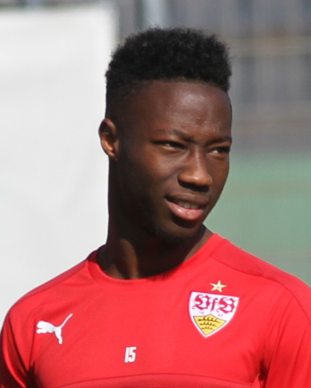 Carlos Mané beim ersten öffentlichen Training. Aufgenommen von